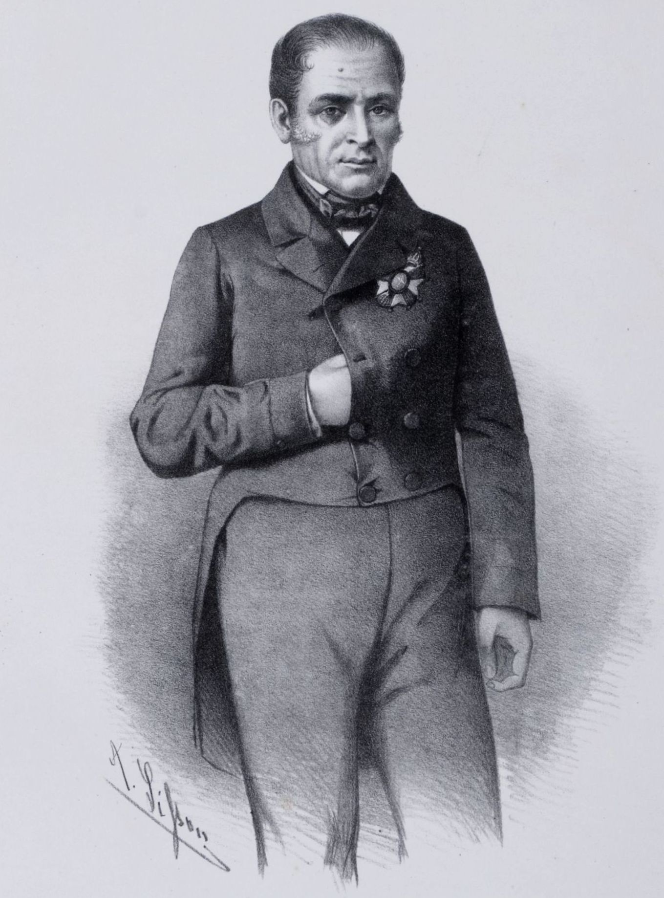 Litografia em preto e branco